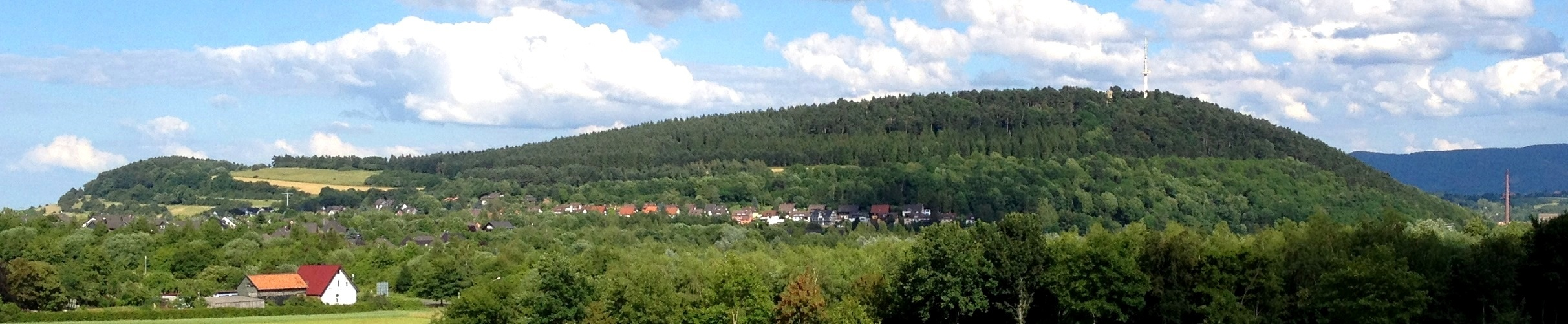 Goslar, Sudmerberg von Westen